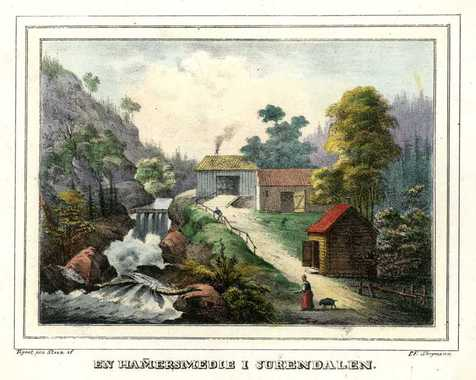 Landskap fra Surnadal med bygninger ved foss. Håndkolorert trykk på papir limt på papp. Innskrift:Påskrift (Trykt): EN HAMERSMEDIE I SURENDALEN. Signatur (Trykt): Tegnet paa Steen af P.F. Wergmann Påskrift (Maskinskrift på pappen): En hamersmedie i Surendalen / Surnadal / Møre og Romsdal / Fargelagt litografi av P.F. Wergmann / 1835, Påskrift (Maskinskrift på pappens bakside): Innkjöpt 1917. Fra "Norsk Prospekt Samling" hefte 6 1835